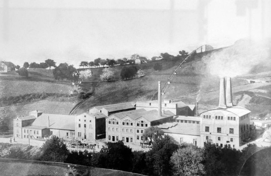 Zementfabrik Lägern in Oberehrendingen